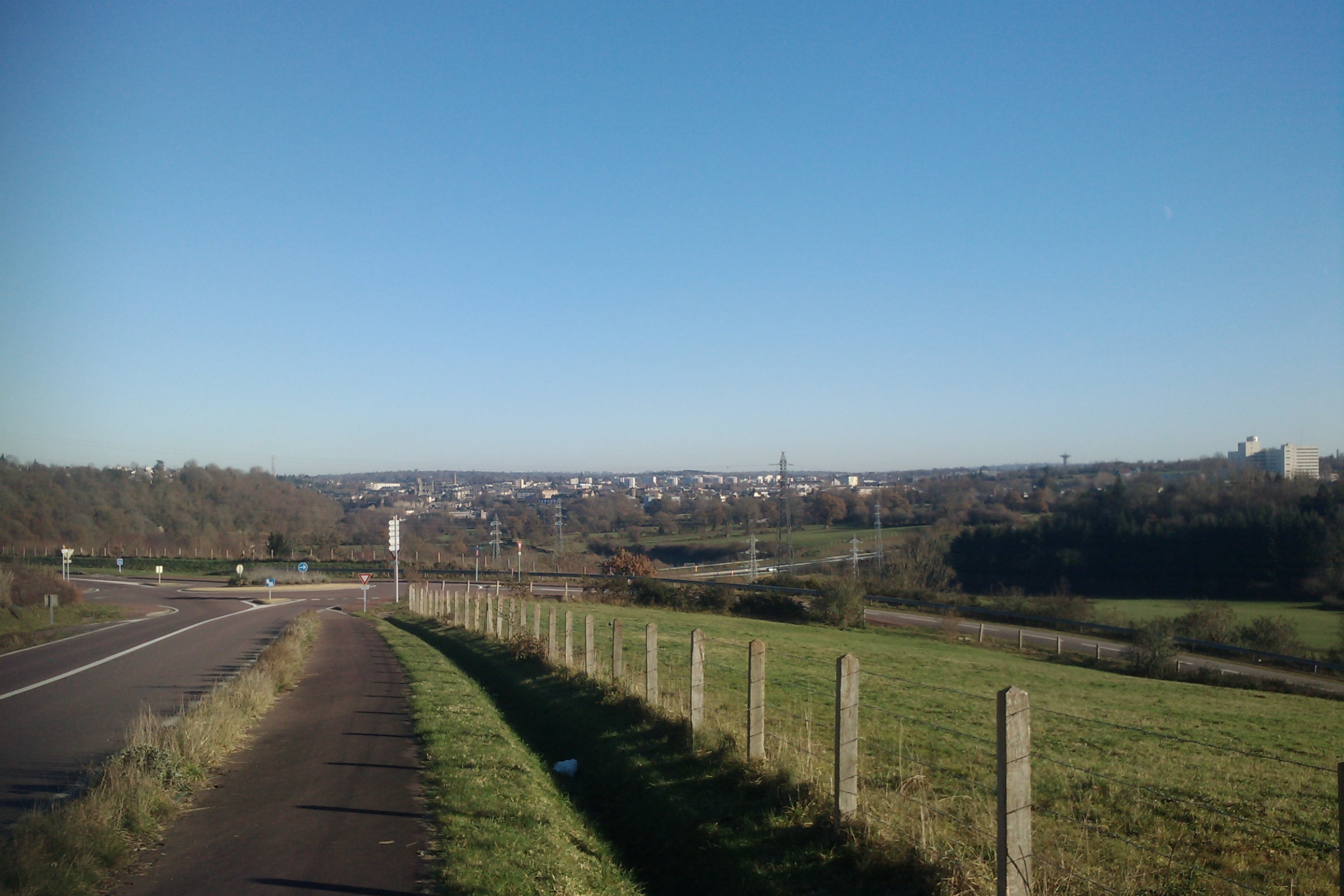 Vue générale de Saint-Lô pris depuis la Vire à Agneaux L'hopital mémorial situé à droite